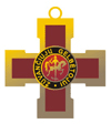 Žūvančiųjų gelbėjimo kryžius